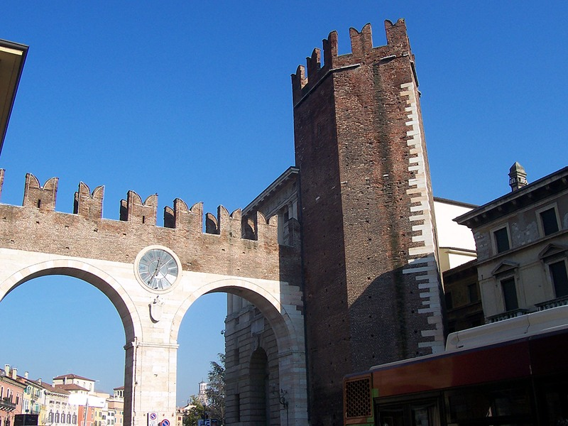 Verona - Porta Bra